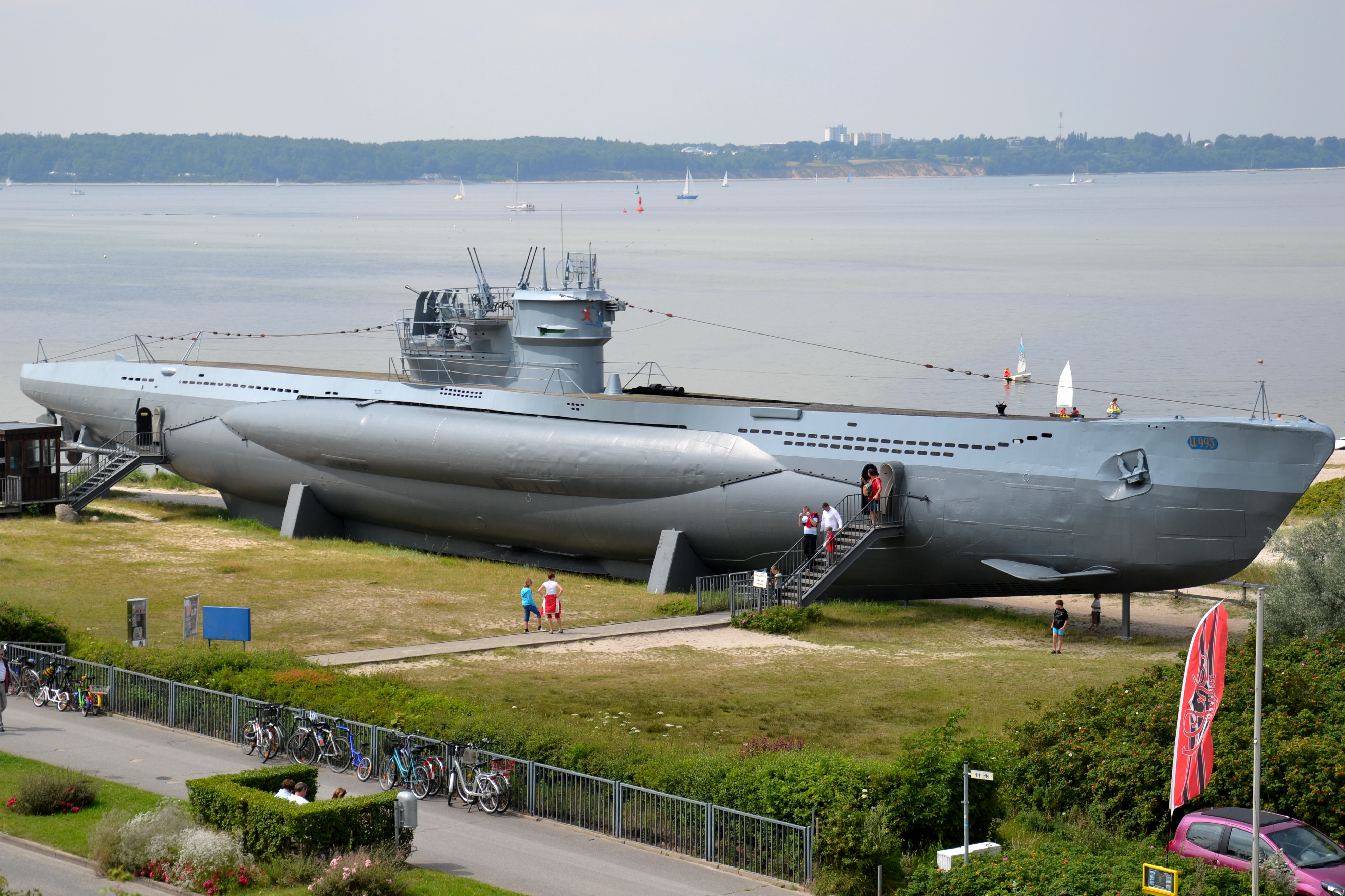 U-Boot U995 am Marineehrenmal in Laboe (Holstein)